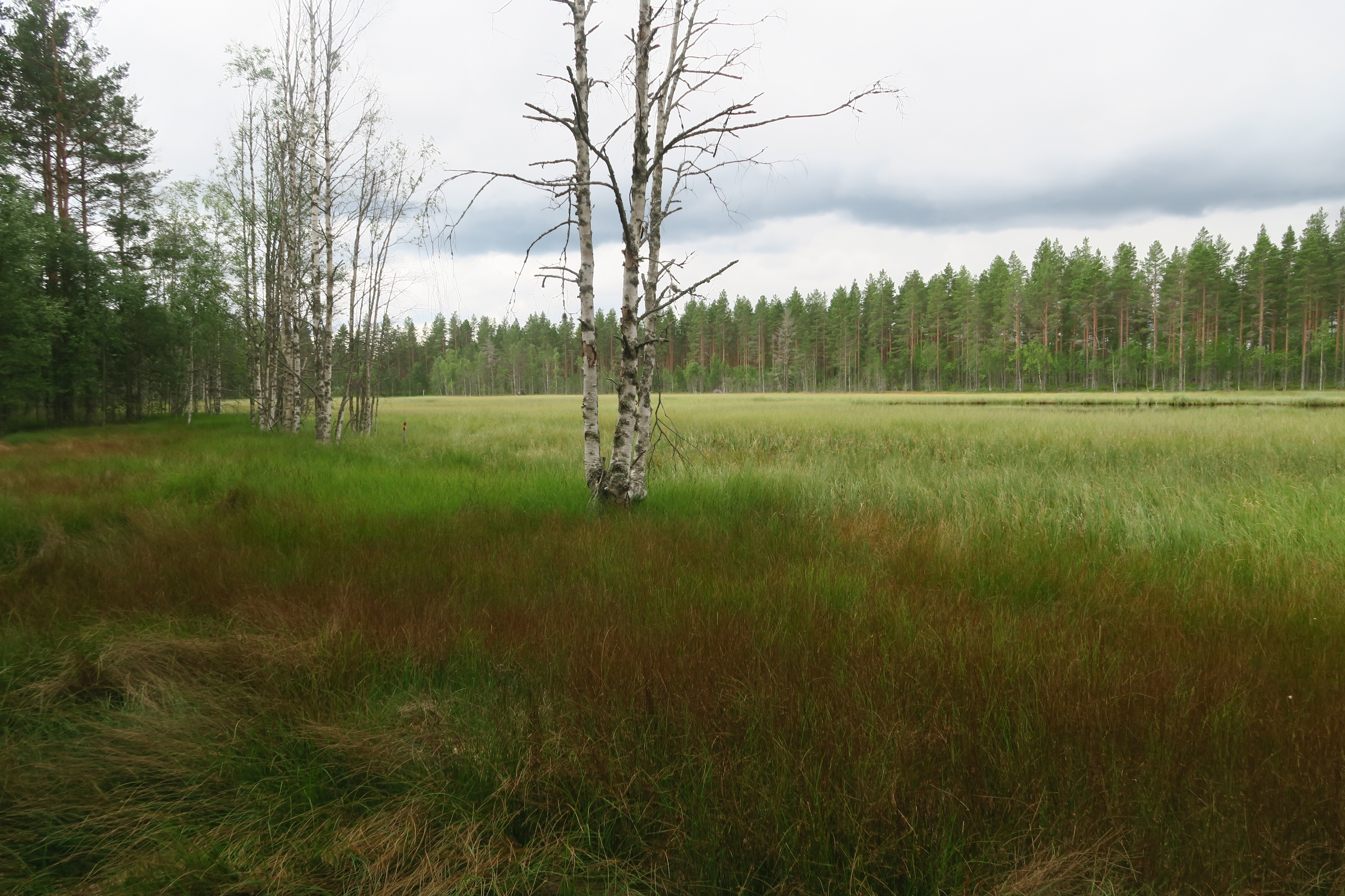 Maantielakso Kauhanevan - Pohjakankaan kansallispuistossa elokuussa 2017. Näkymä idästä.